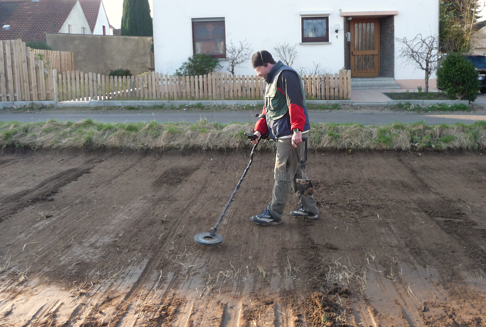 Ausgrabung auf dem Areal des Römerlagers Porta Westfalica